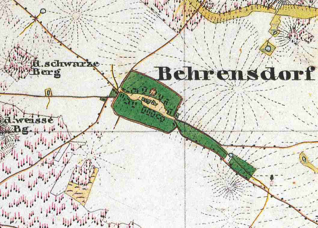 Behrensdorf, Ortsteil der Gemeinde Rietz-Neuendorf, Lkr. Oder-Spree, Brandenburg, Deutschland, Ausschnitt aus dem Urmesstischblatt 3850 Kossenblatt von 1846